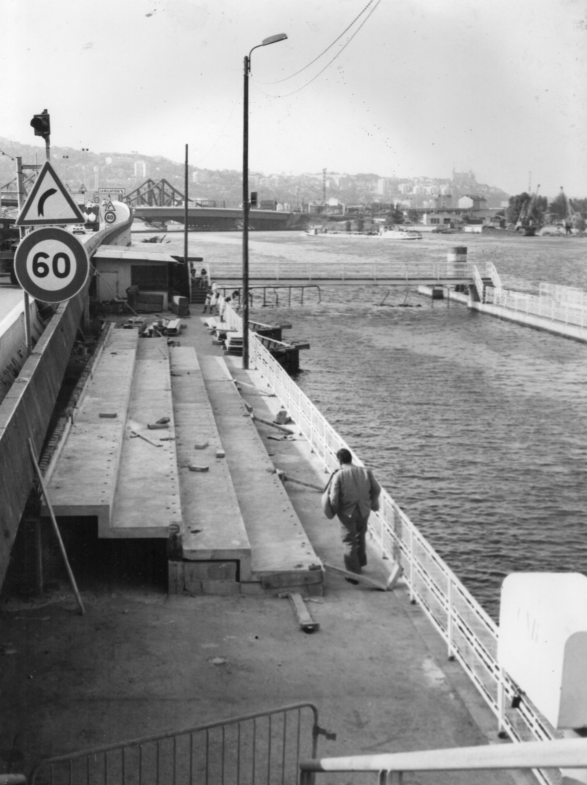 Chantier de construction des gradins.